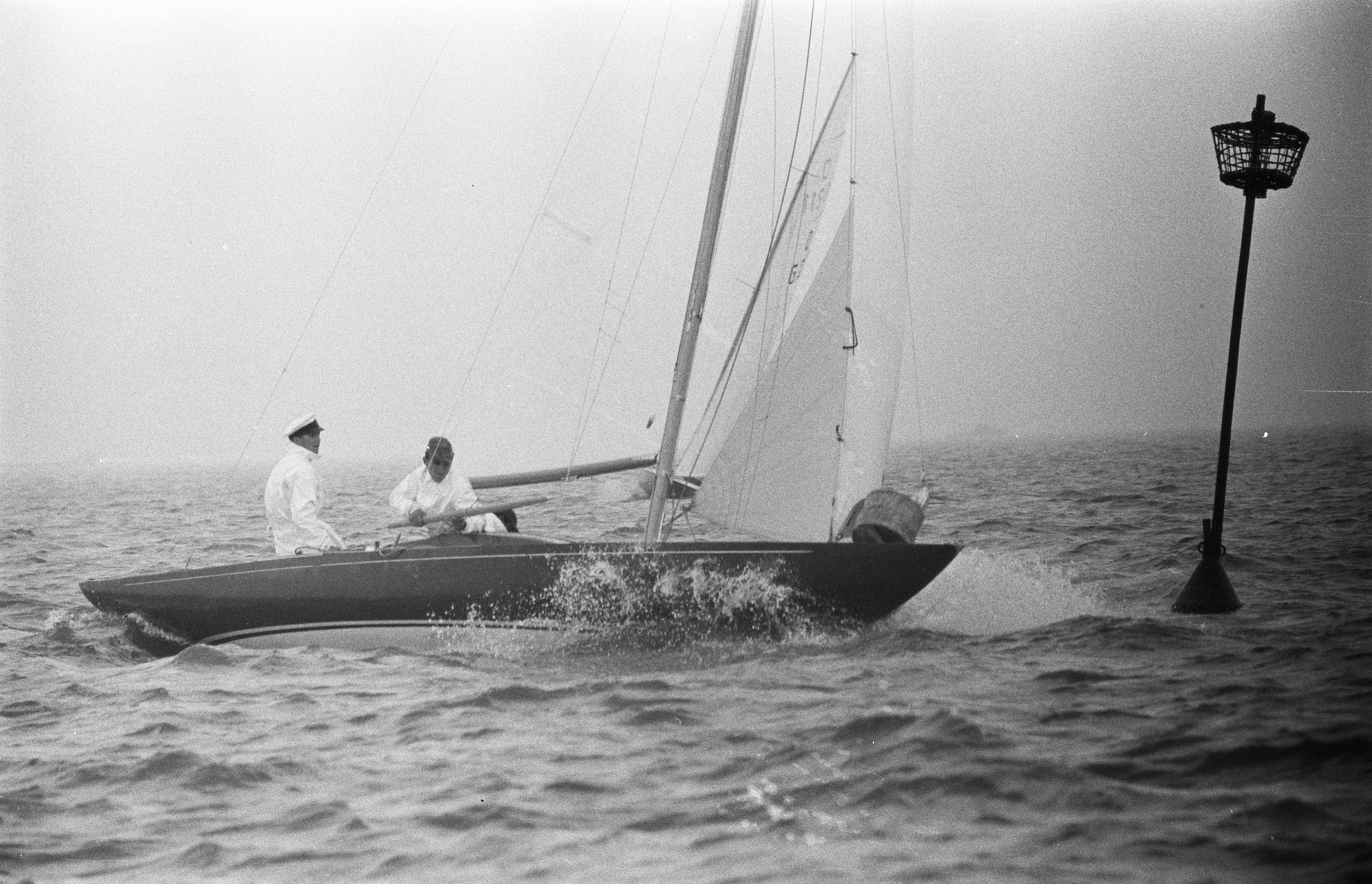 Collectie / Archief : Fotocollectie Anefo Reportage / Serie : [ onbekend ] Beschrijving : Zeilwedstrijden op het IJsselmeer om Drakencup 1960 overzicht wedstrijd Datum : 5 juli 1960 Locatie : IJsselmeer Trefwoorden : ZEILWEDSTRIJDEN, overzichten, wedstrijden Fotograaf : Bilsen, Joop van / Anefo Auteursrechthebbende : Nationaal Archief Materiaalsoort : Negatief (zwart/wit) Nummer archiefinventaris : bekijk toegang 2.24.01.05 Bestanddeelnummer : 911-3973